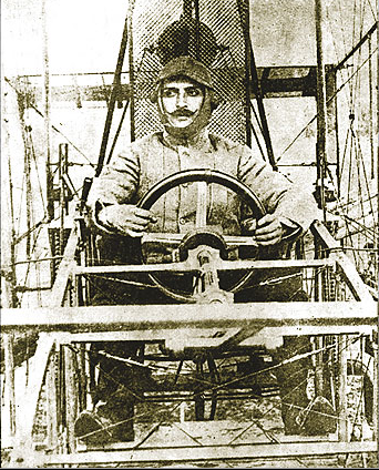 José Luis Sánchez Besa (Santiago, Chile, 13 de febrero de 1879 - París, Francia, 2 de marzo de 1955) fue un abogado, piloto civil, diseñador y constructor de aviones. Se convirtió, en 1909 y junto a Emilio Edwards Bello, en el primer chileno en despegar en un avión.